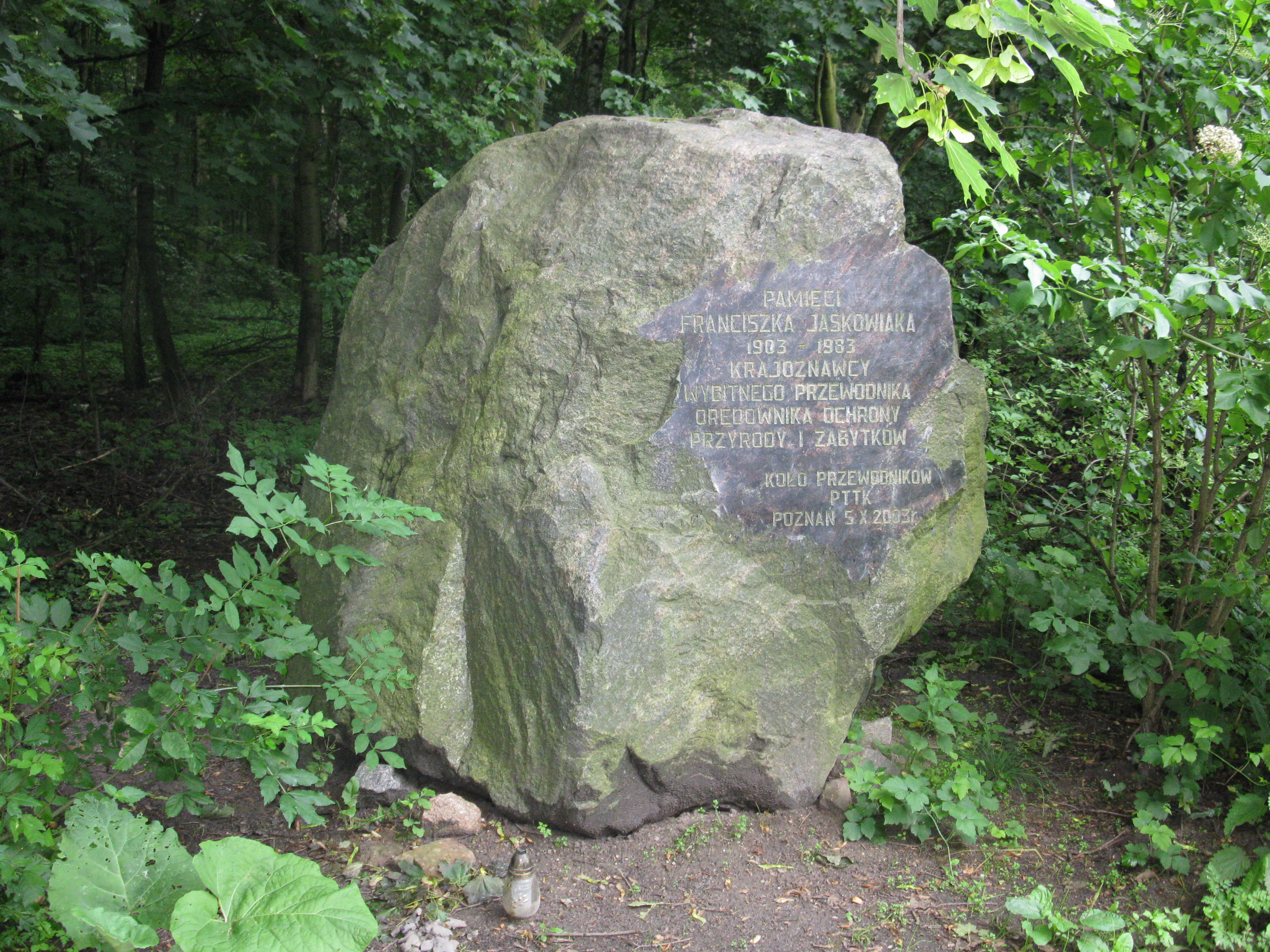 Morasko Meteoryt - Głaz Franciszka Jaśkowiaka